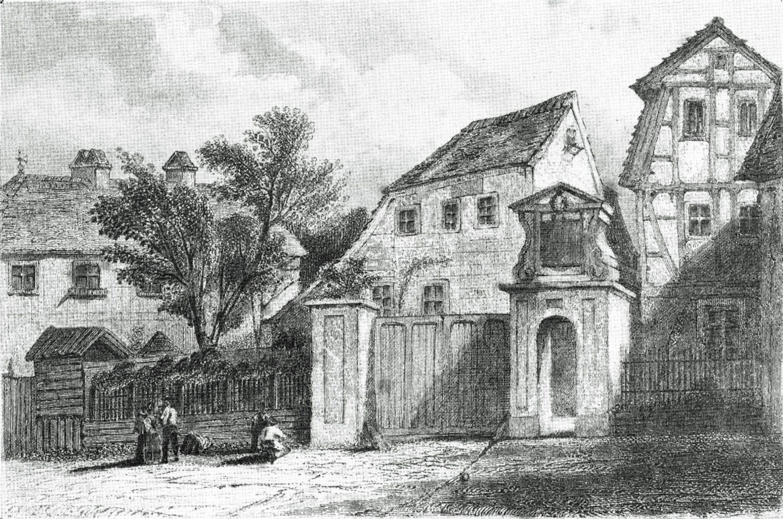 Stich von Albert Henry Payne aus "Leipzig um 1860" (mit 1850 herausgegebenen Stahlstichen): Schillers Haus